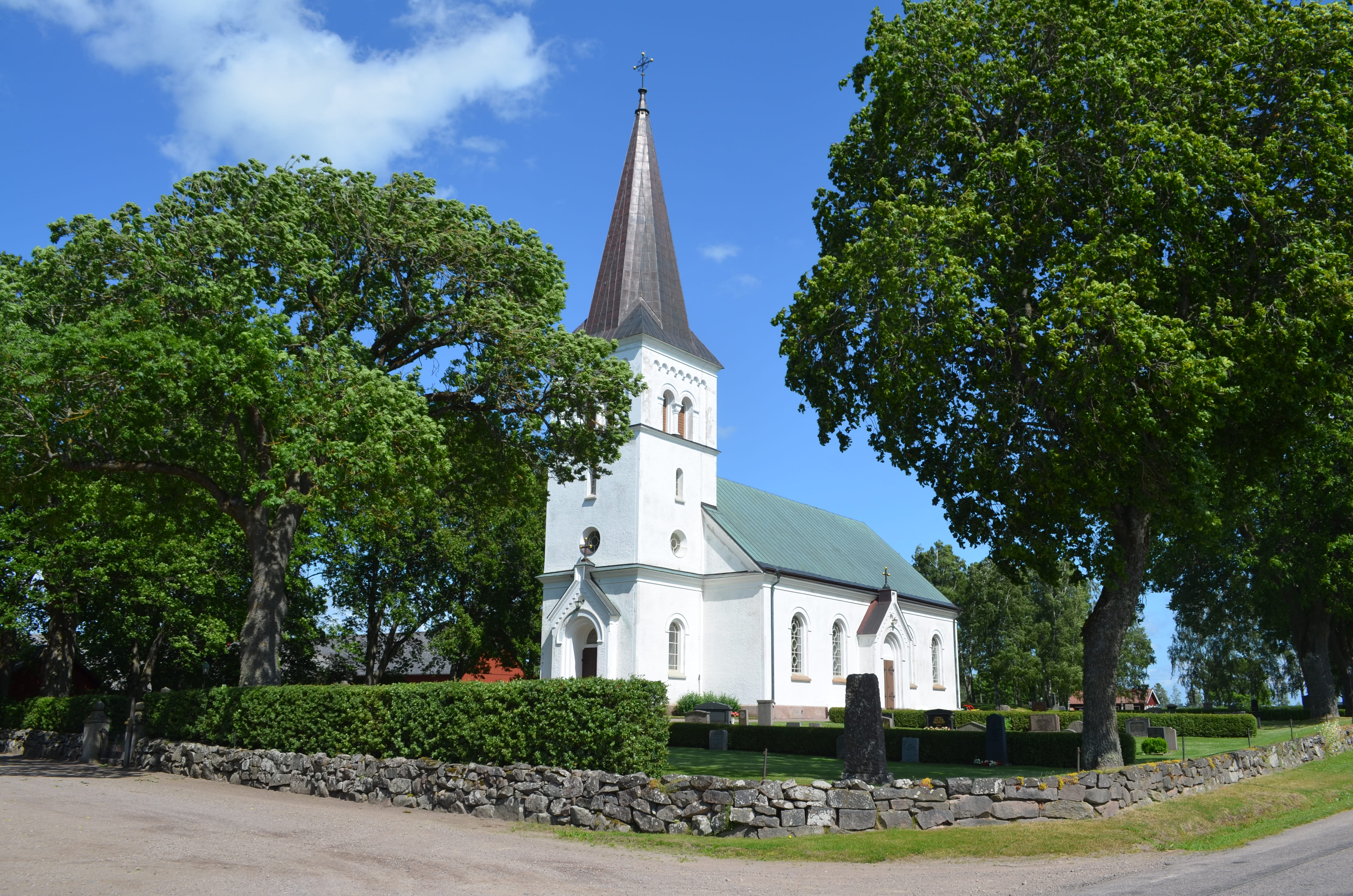 Locketorps kyrka